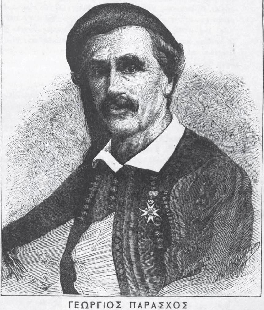 namhafte Griechische Persönlichkeit, 19. Jahrhundert